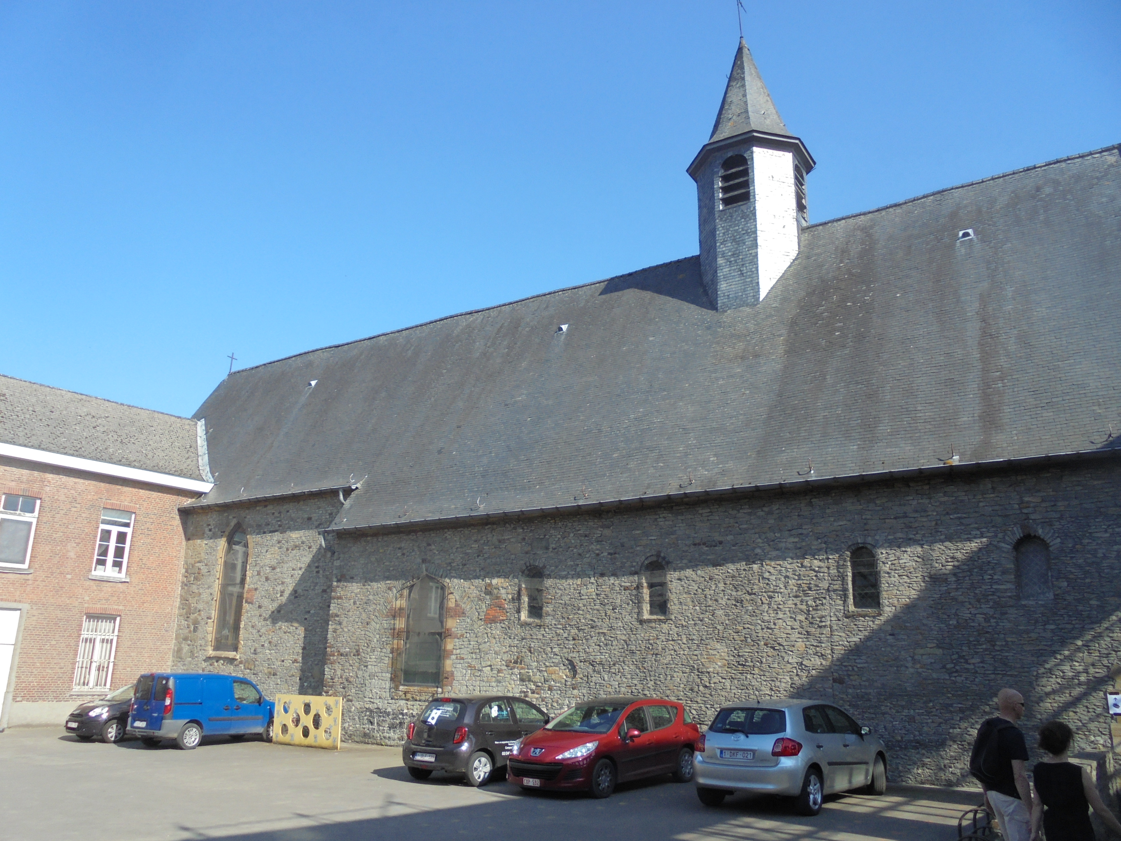 Priorij Hunnegem - Gasthuisstraat - Geraardsbergen - Oost-Vlaanderen - België